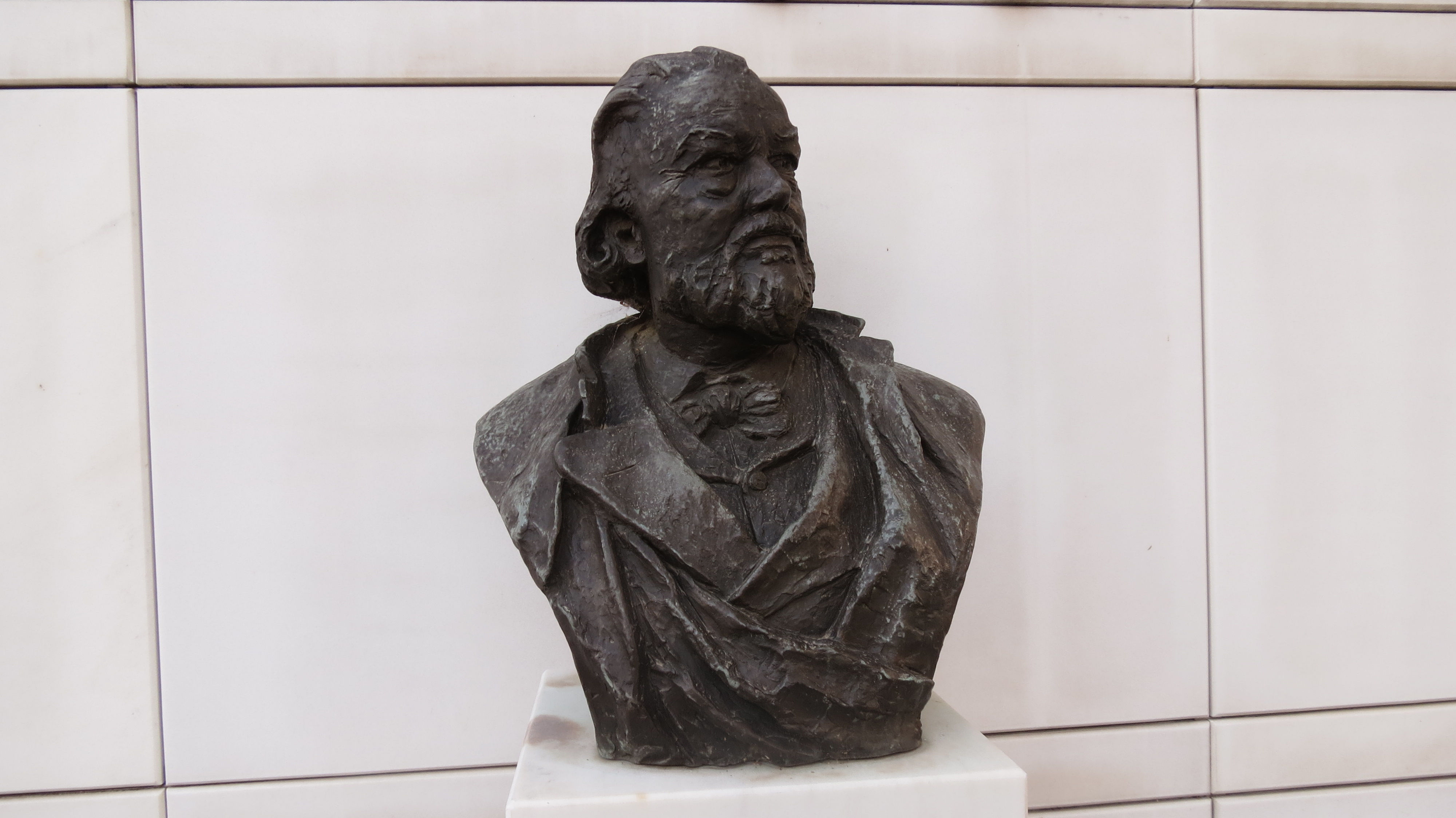 Büste zum 100. Geburttag des Krankenhauses von Meran